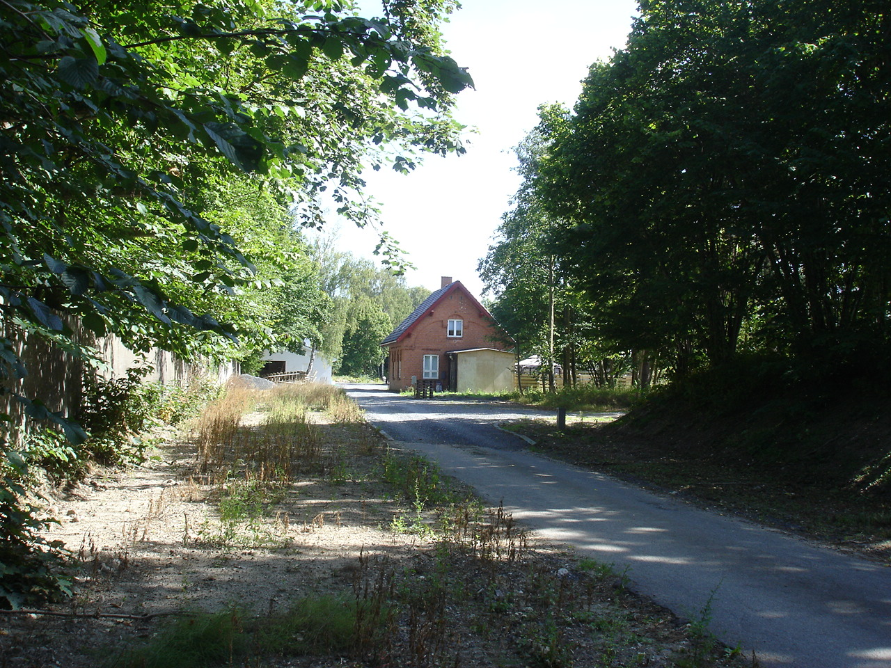 Lindholm Station (Slangerupbanen)